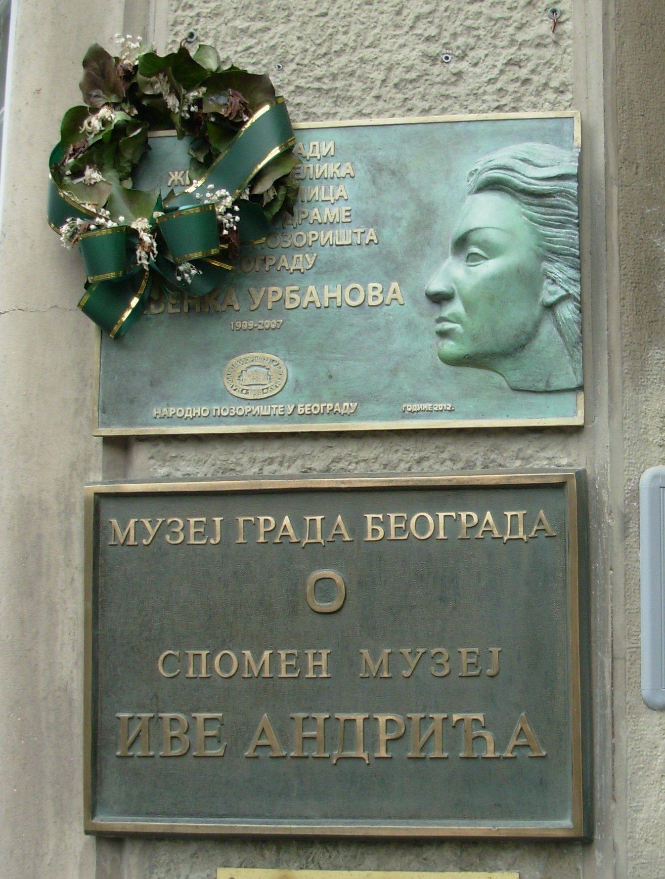 Табла на згради, Обилићев венац, Београд. Невенка Урбанова је становала у истој згради са Ивом Андрићем. Сликао Голдфингер